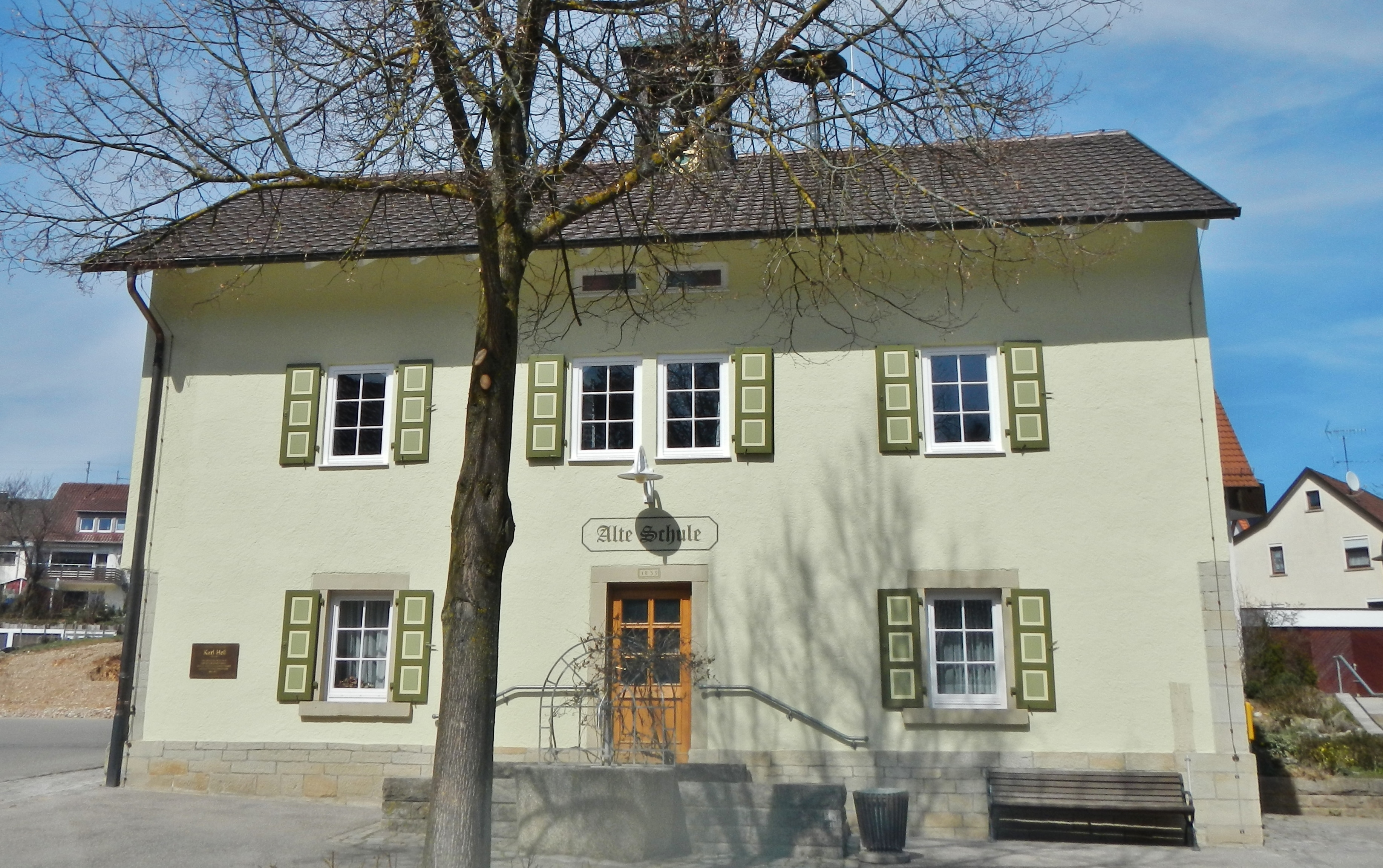 Alte Schule von 1839 in Aidlingen-Lehenweiler